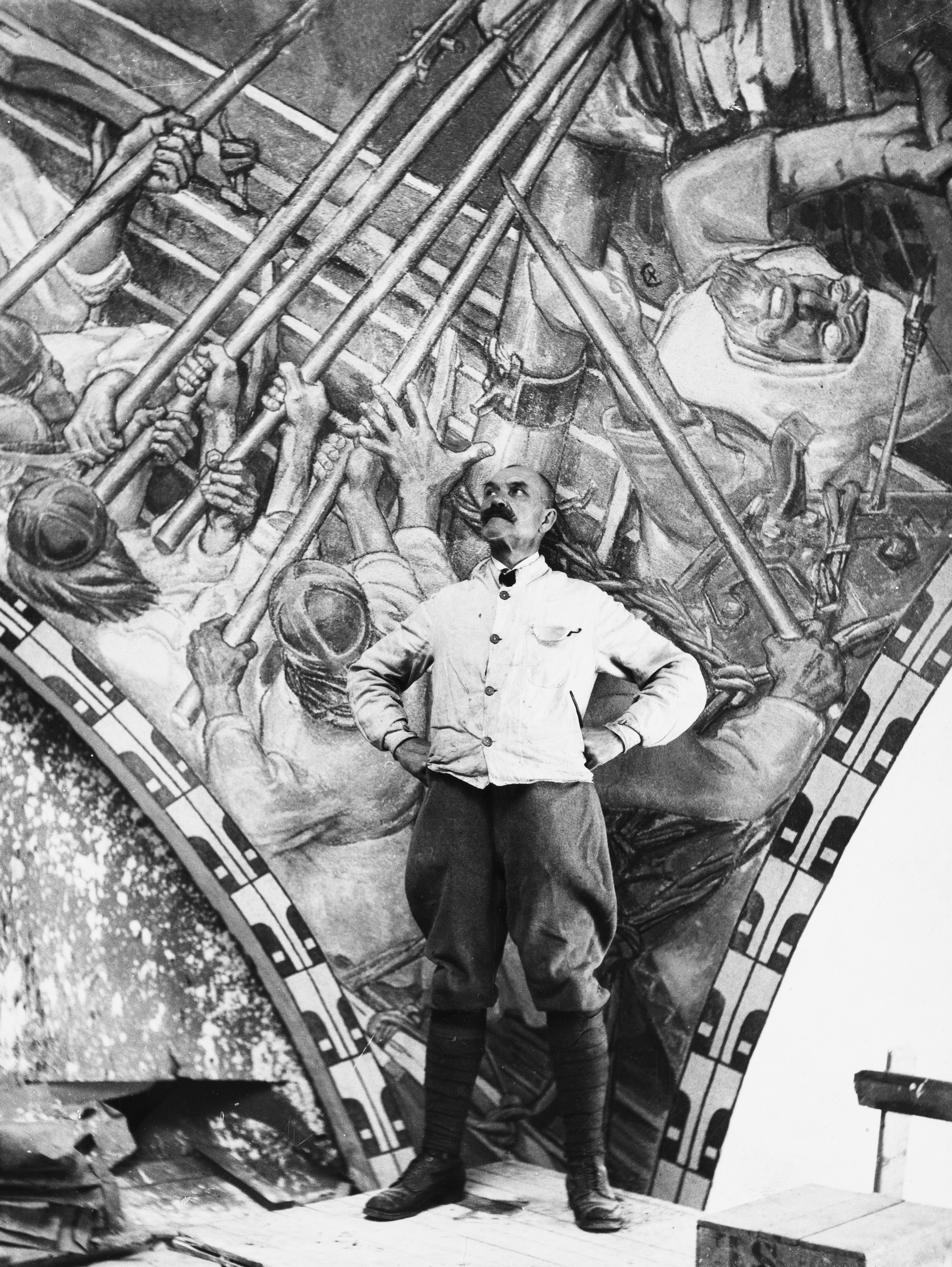 Akseli Gallen-Kallela ja Kansallismuseon fresko Sammon puolustus 1928